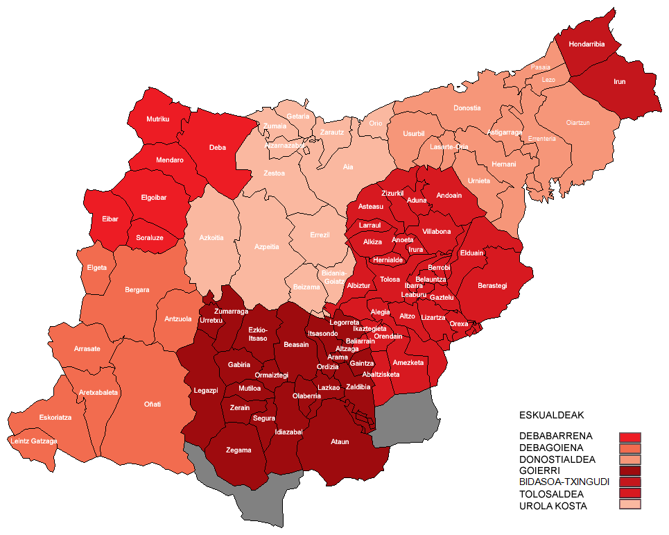 Mapa de los municipios de Guipúzcoa (nombres en euskera según Euskaltzaindia).